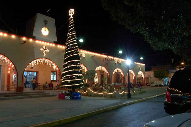 Vista de la Presidencia Municipal de Purísima del Rincón durante la época navideña